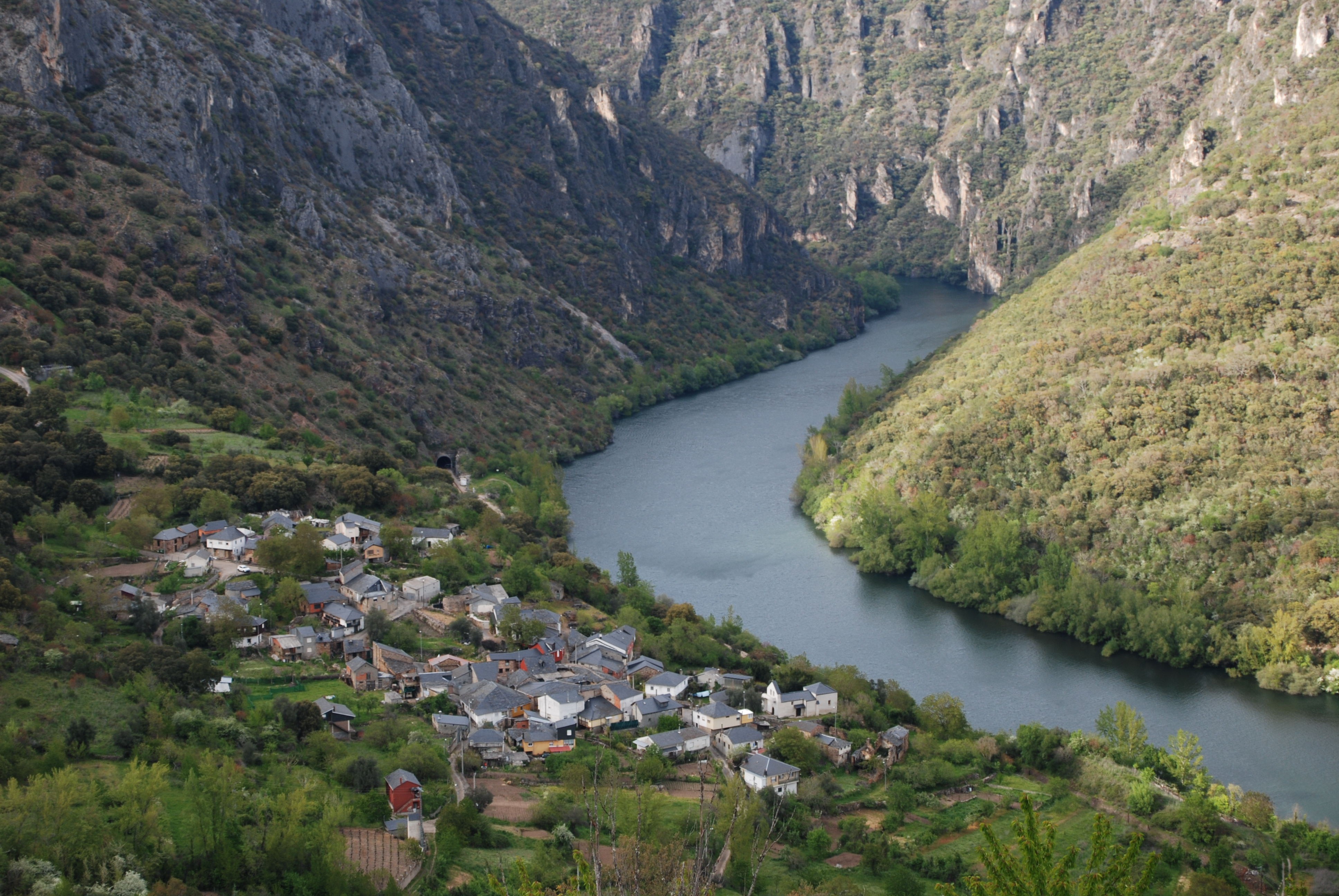 Serra da Enciña da Lastra. Aldea de Covas, no concello de Rubiá. This is a photography of a Special Area of Conservation in Spain with the ID: ES1130009. Natura2000 entry, EEA entry